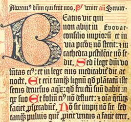 Mainz psalter, detail